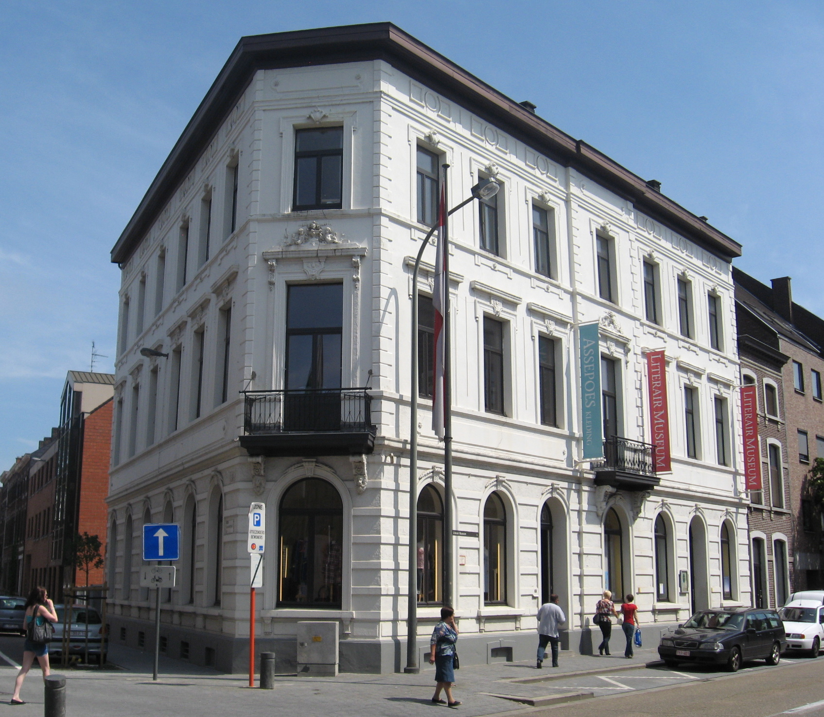 Herenhuis, hoekhuis, Bampslaan 37 in Hasselt